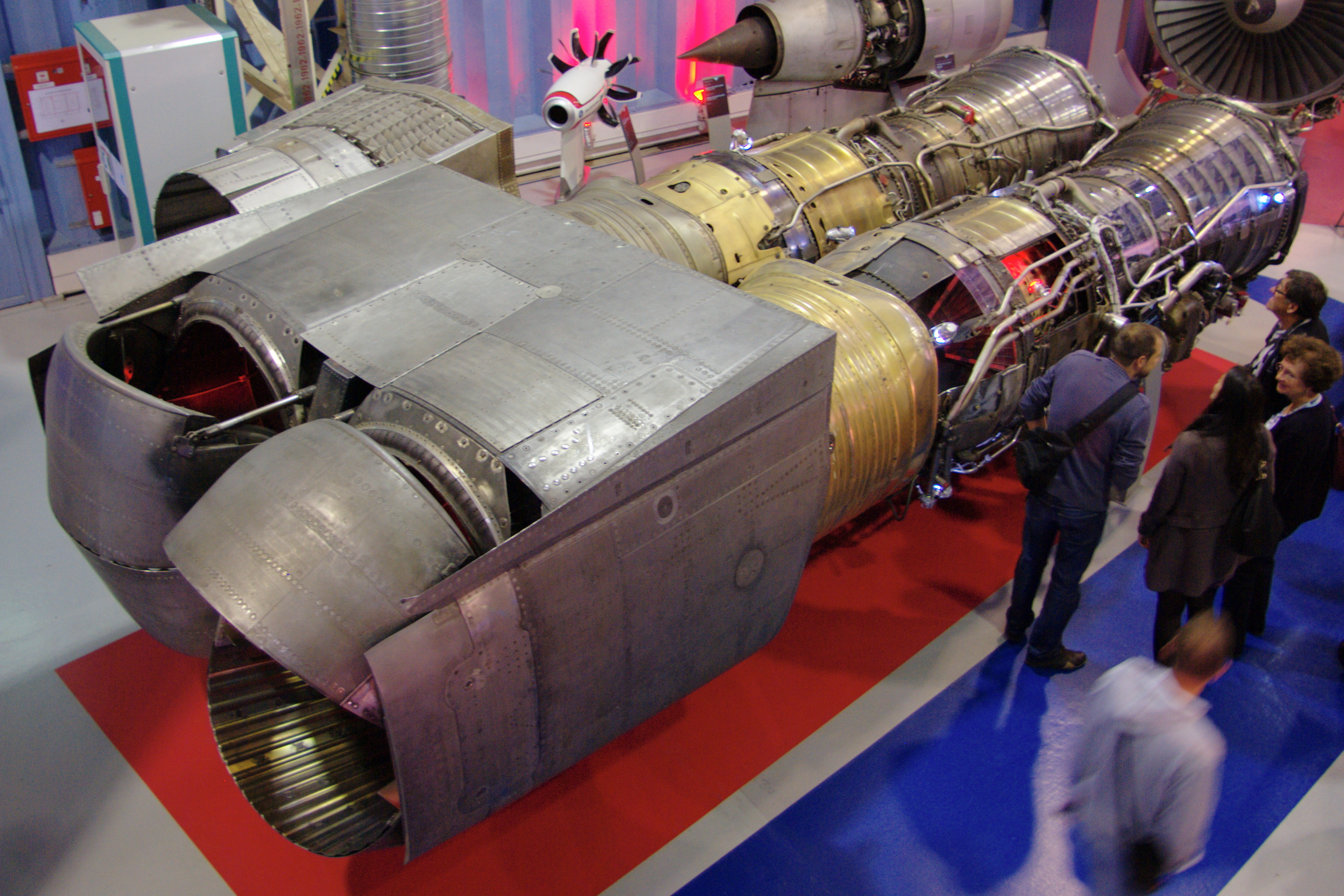 Deux Rolls-Royce-Snecma Olympus exposés au musée Safran.